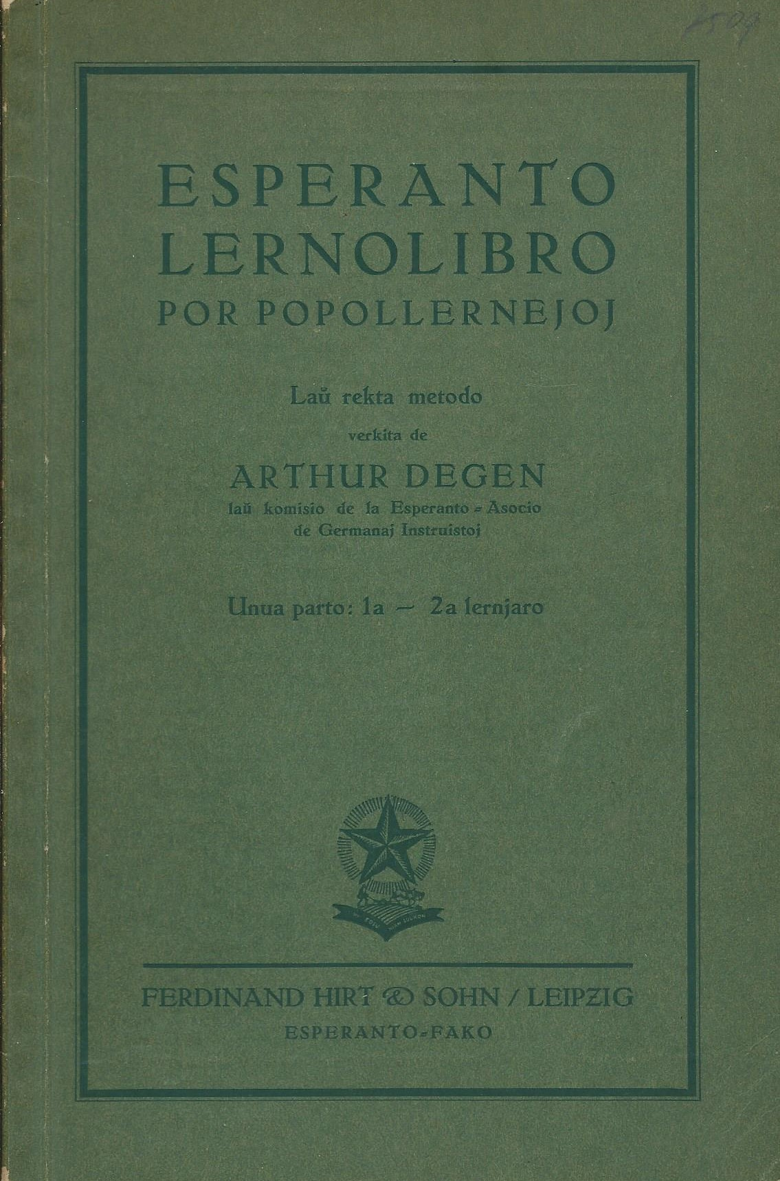 librokovrilo de libro "Esperanto Lernolibro por Popollernejoj", 1930